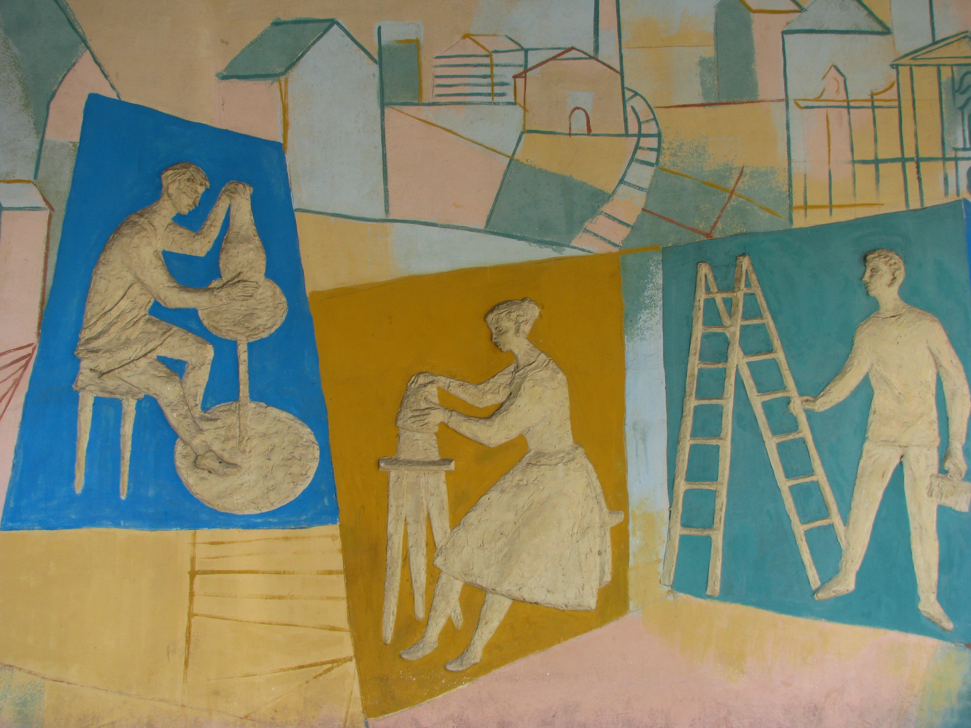 Landesberufsschulen, Innsbruck-Wilten. Wandgestaltung im Eingangsbereich von Emmerich Kerle (Plastik) und Fritz Berger (Malerei), 1956 This media shows the remarkable cultural object in the Austrian state of Tyrol listed by the Tyrolean Art Cadastre with the ID 34380. (on tirisMaps, pdf, more images on Commons, Wikidata)